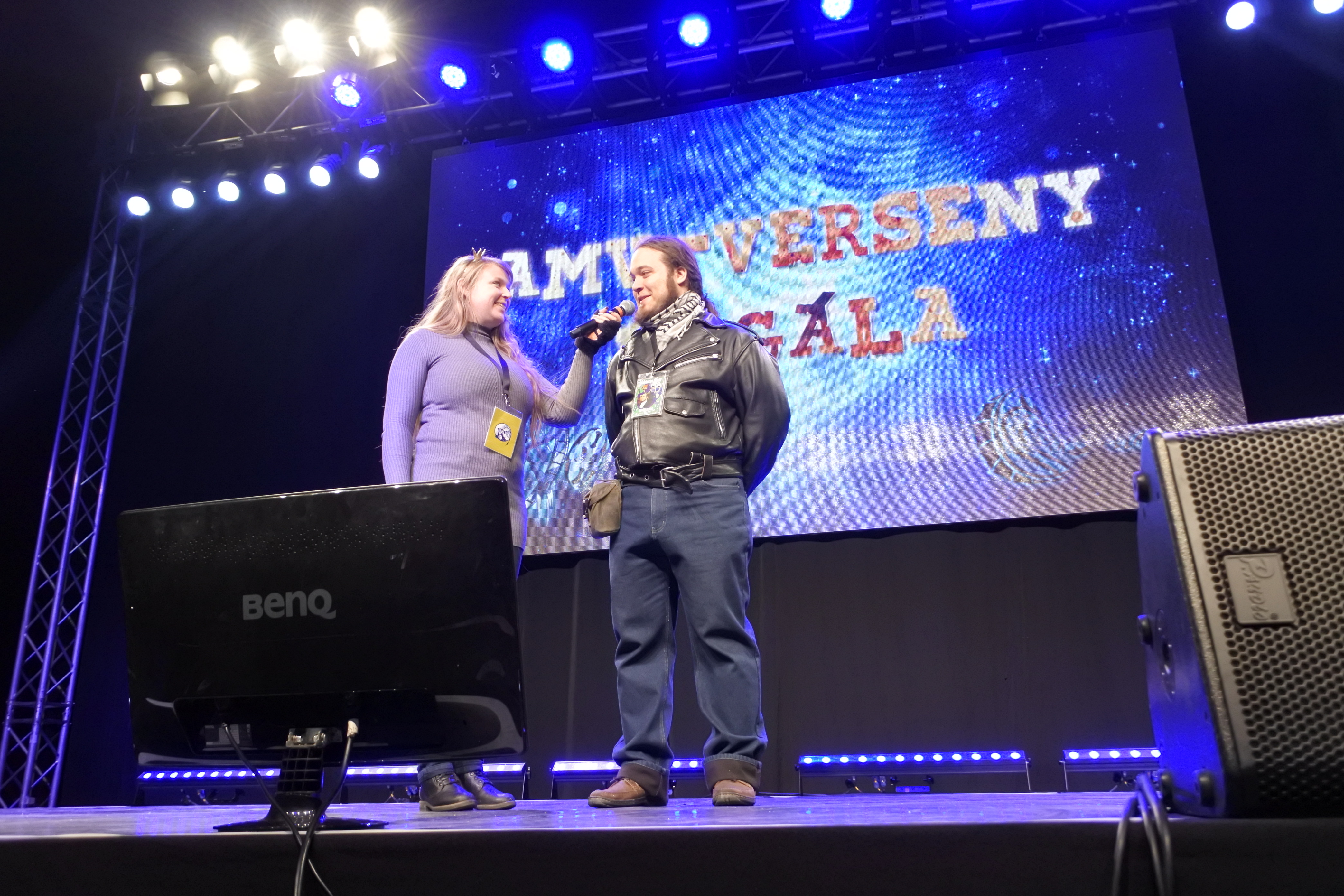 A 2019 MondoCon AMV versenye előtti konferálásról készült kép. A képen a két konferáló látható, akik közül az egyikük a verseny szervezője, a másikuk pedig az egyik zsűri.